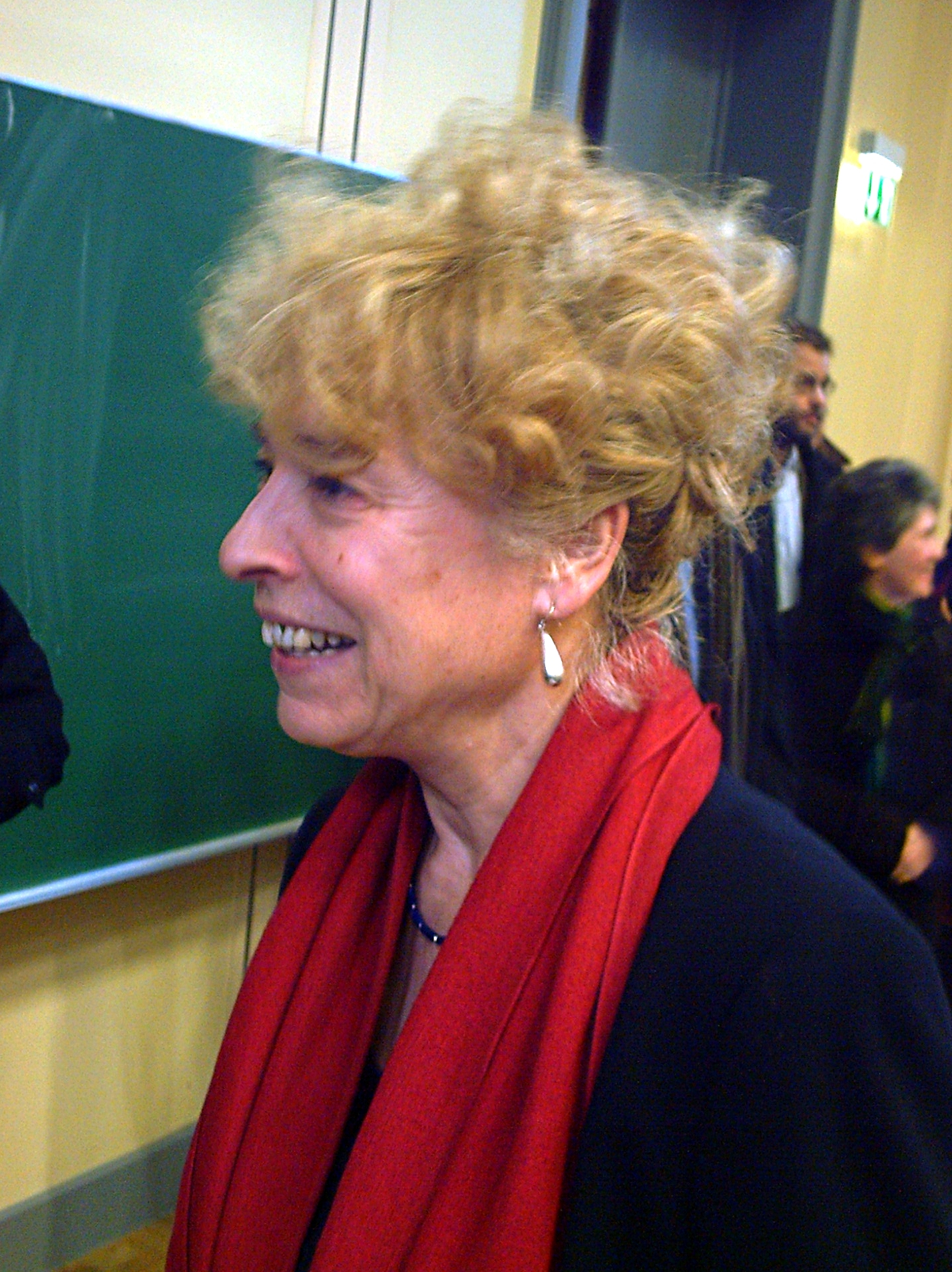 Prof. Gesine Schwan, Präsidentin der Europa-Universität Viadrina, beim Tübinger Symposium Welche "Universität braucht die Wissensgesellschaft?" (WikiNews)